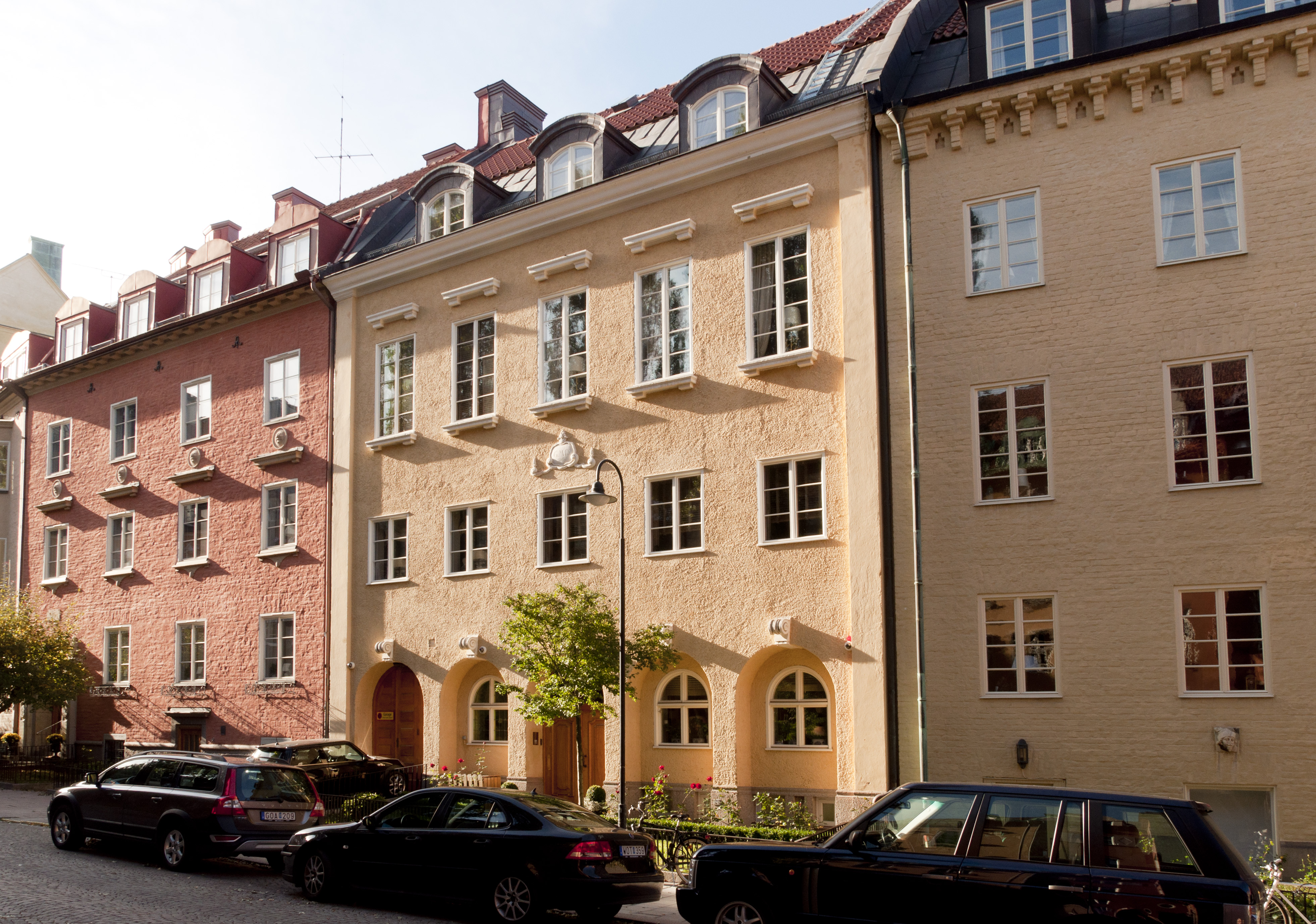 Tysta gatan 7. Byggnadsår 1918-19, arkitekt Gustaf Adolf Falk, byggherre G Diedrichs, byggmästare S D Larsson